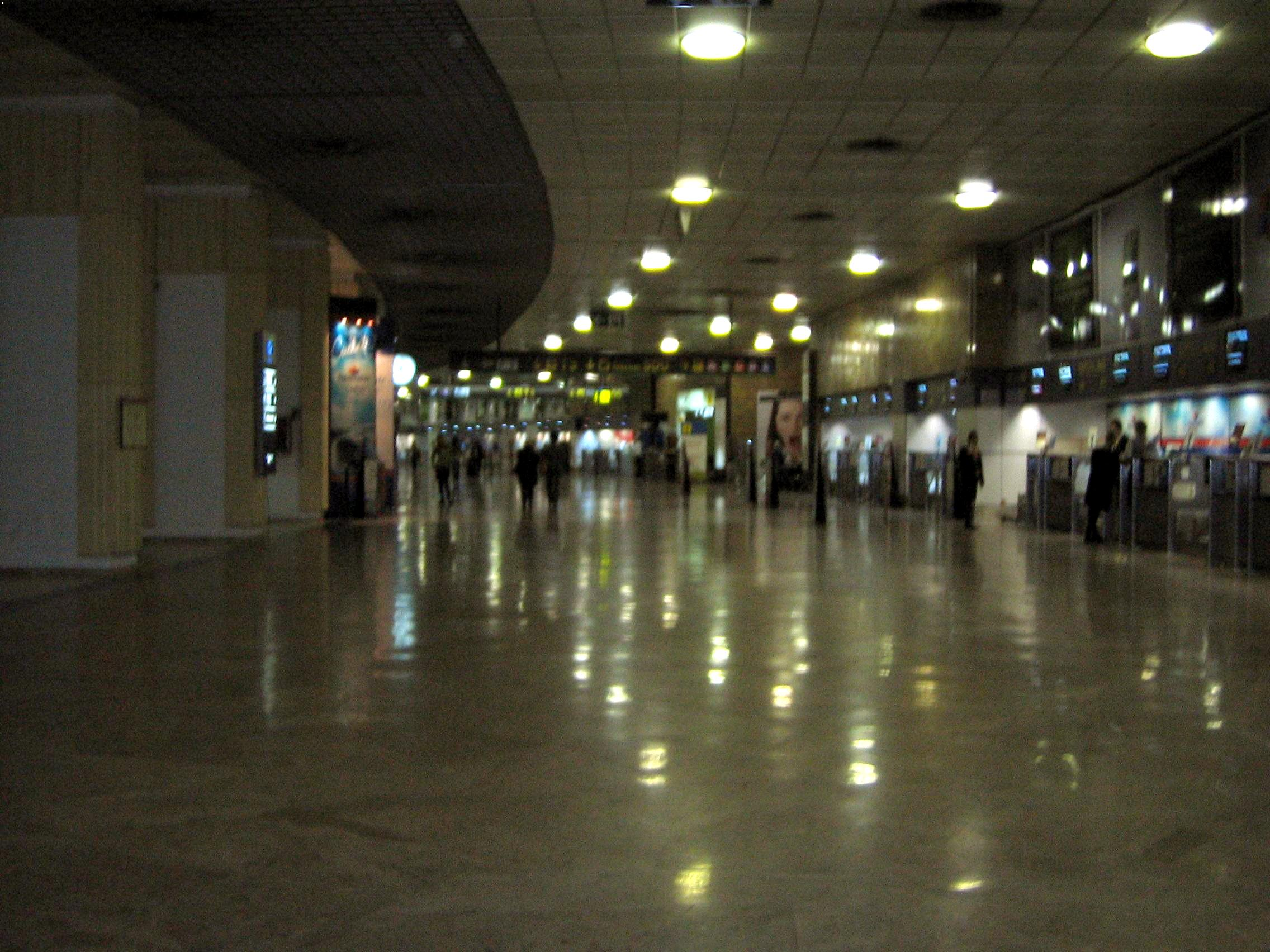 Pasillo de la Terminal-1 del aeropuerto de Madrid-Barajas